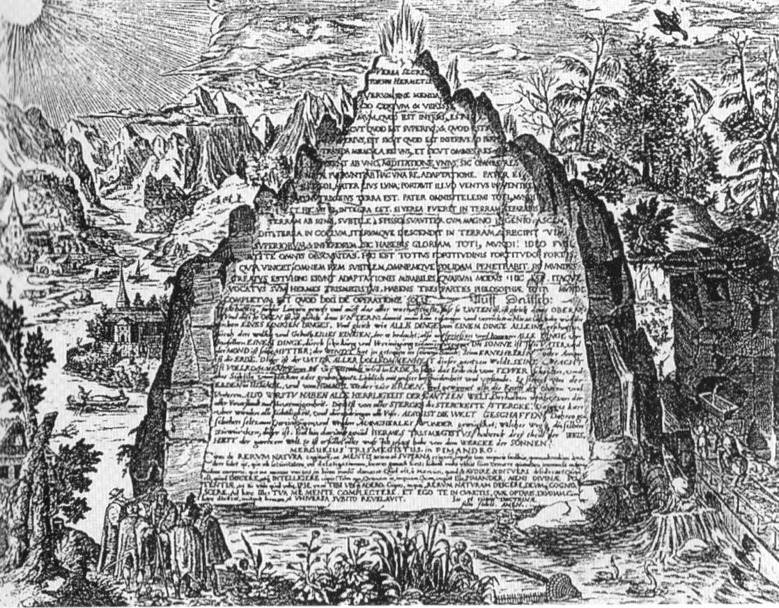 Smaragdtafel in Heinrich Khunraths Buch Amphitheatrum sapientiae aeternae.